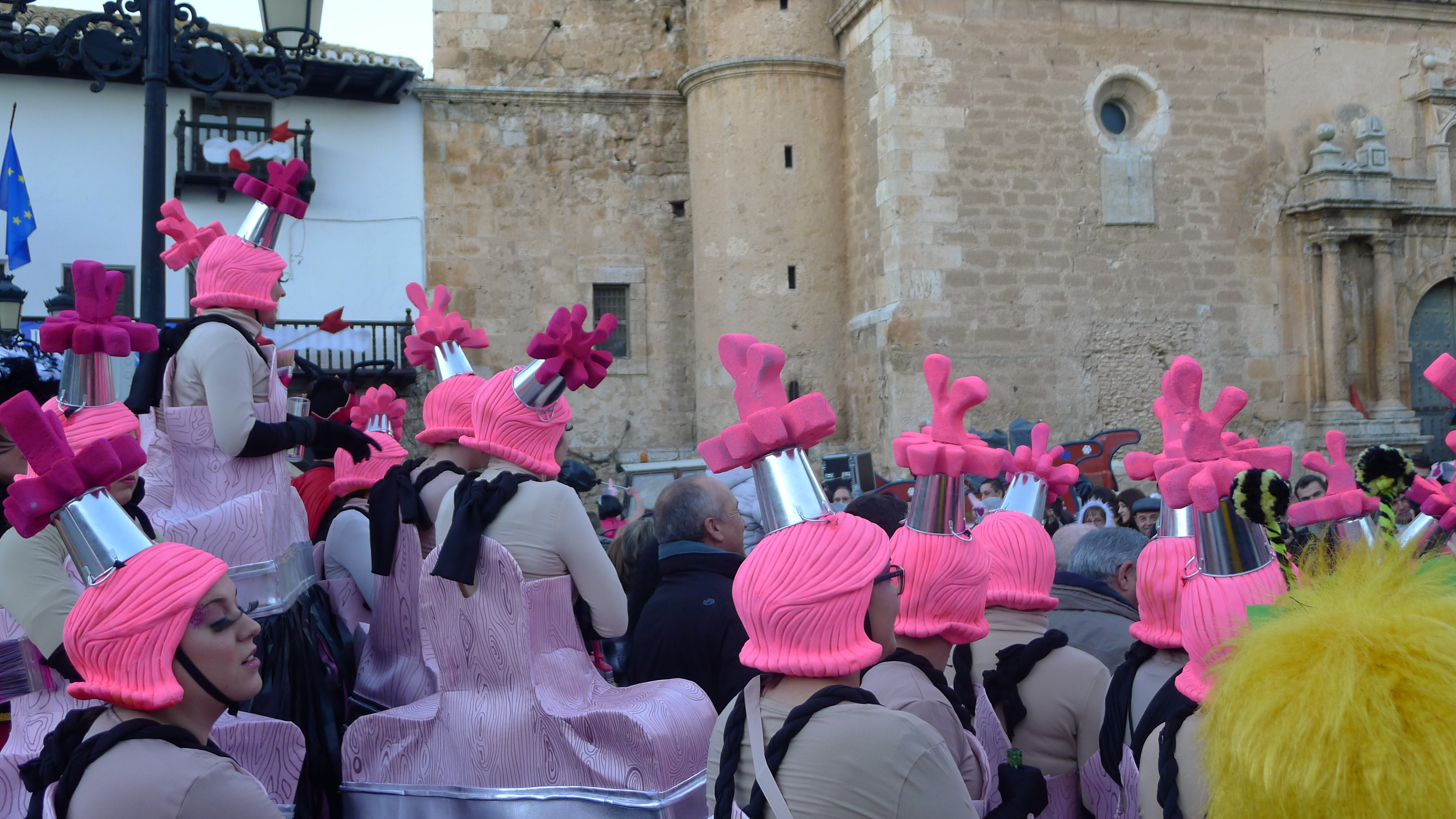 Carnaval 2015